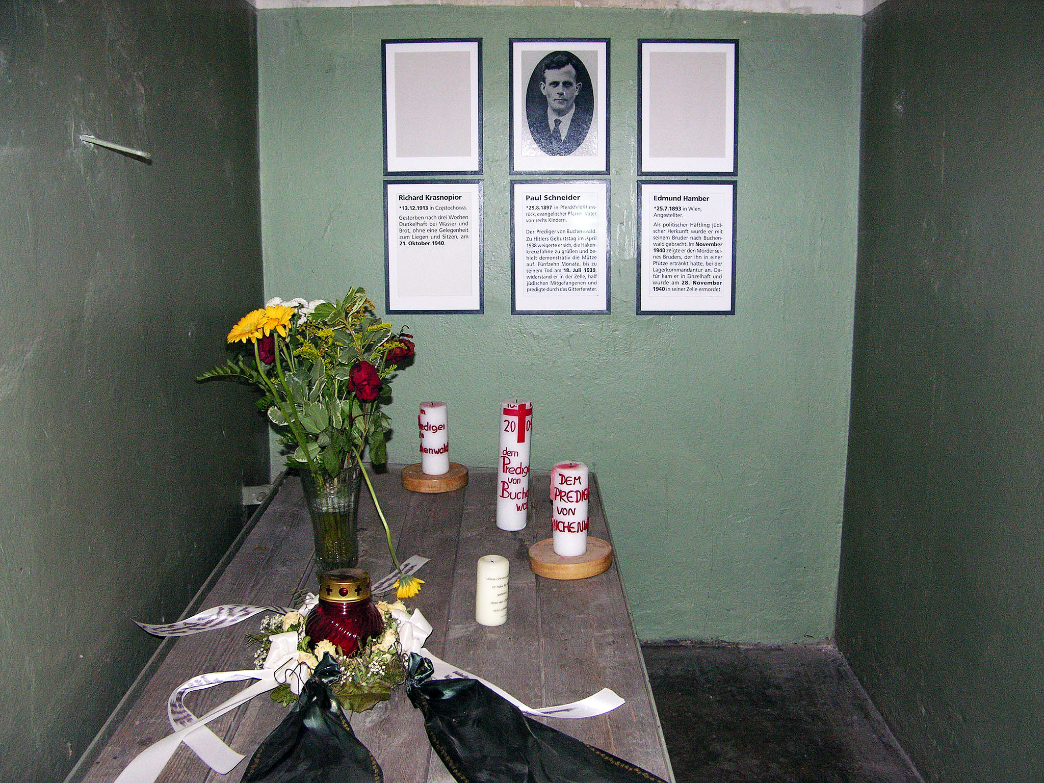 Gedenkstätte Buchenwald, eine Einzelzelle im Arrestgebäude, die nun u. a. Pfarrer Paul Schneider gewidmet ist. Text auf der Tafel: Paul Schneider, *29. August 1897 in Pferdsfeld/Hunsrück, evangelischer Pfarrer, Vater von sechs Kindern. Der Prediger von Buchenwald. Zu Hitlers Geburtstag im April 1938 weigerte er sich, die Hakenkreuzfahne zu grüßen und behielt demonstrativ die Mütze auf. Fünfzehn Monate, bis zu seinem Tod am 18. Juli 1939, widerstand er in der Zelle, half jüdischen Mitgefangenen und predigte durch das Gitterfenster.